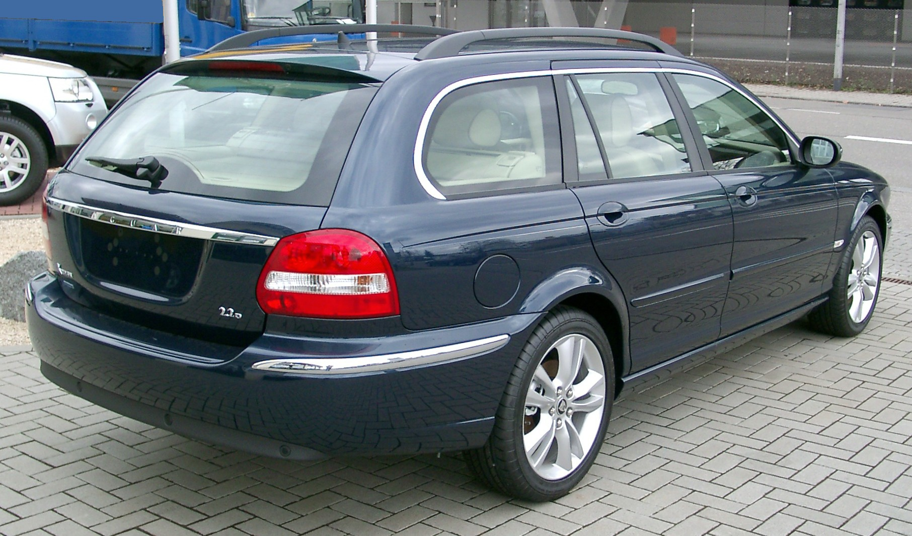 Jaguar X-Type Estate